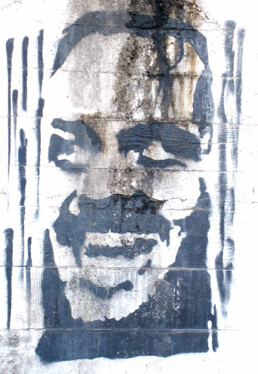 Graffiti en Legutio (Álava)